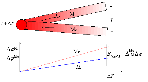 A termofeszültség értelmezése. A termoelem szócikkhez a 3. ábra